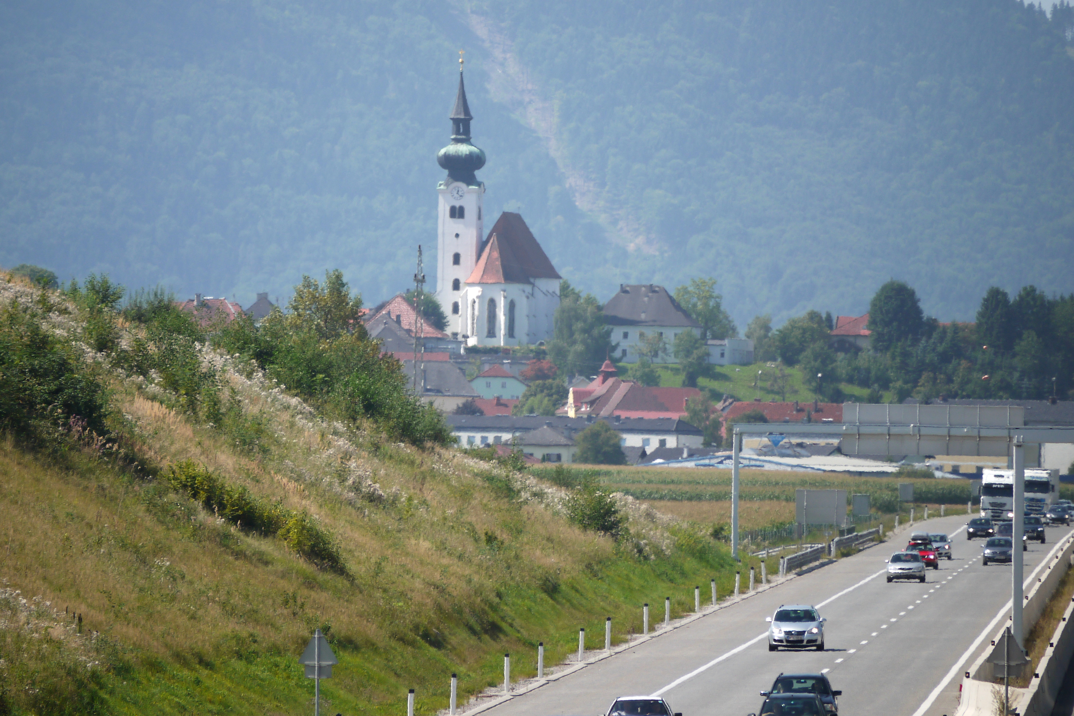 Kath. Pfarrkirche hl. Gallus und ehem. Friedhof